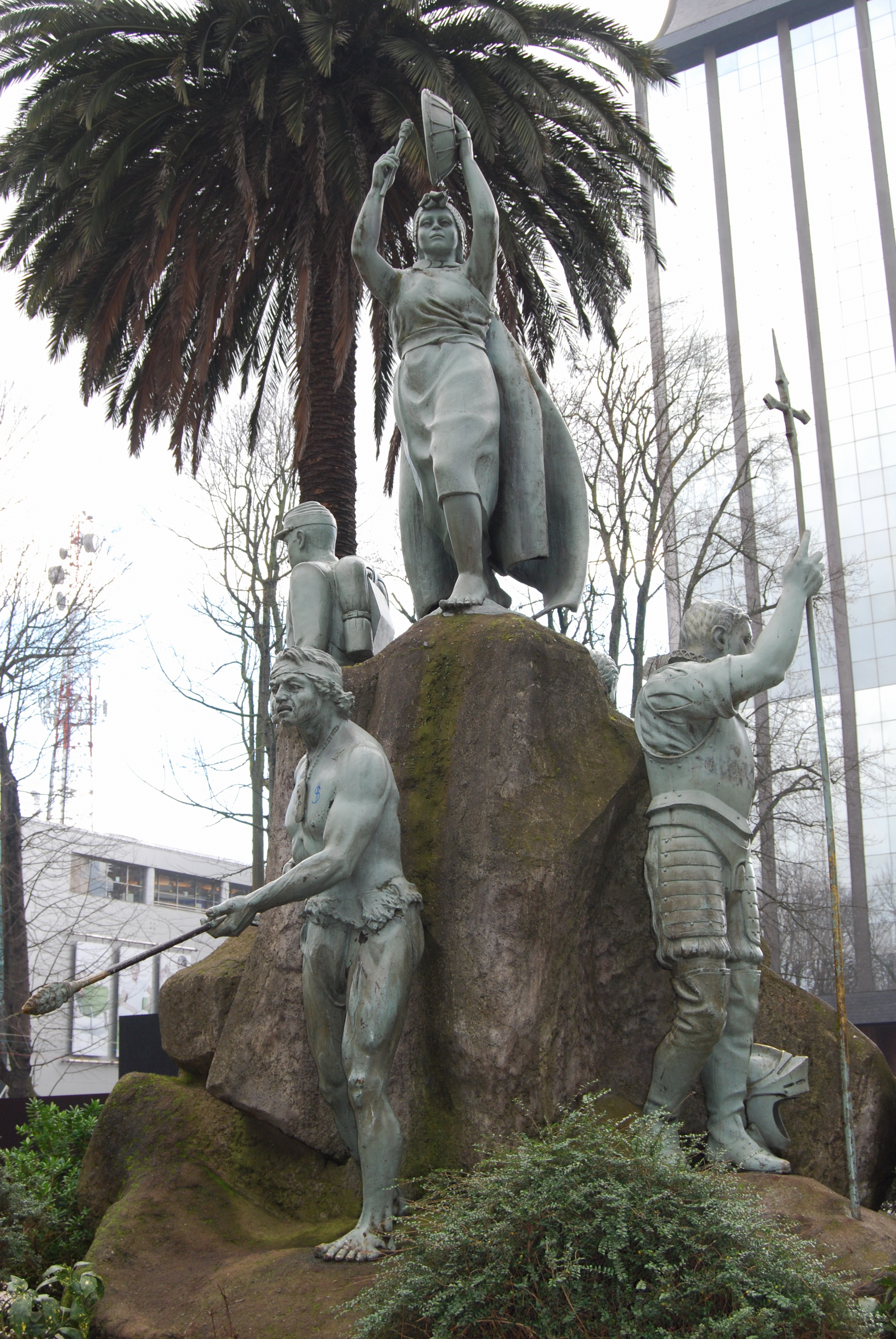 Monumento a la Araucanía (Chile).